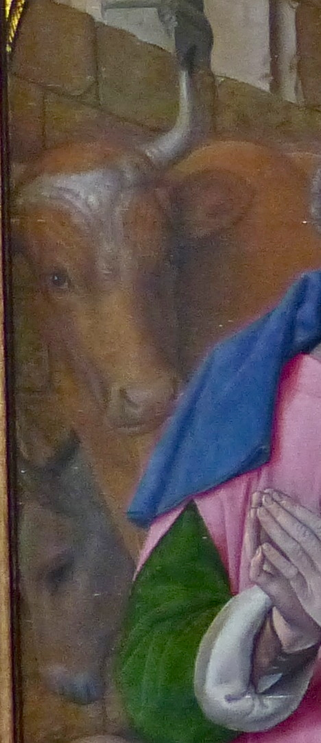 Détail de la présence de l'âne par sa tête représentée sous celle du bœuf dans la Nativité d'Autun